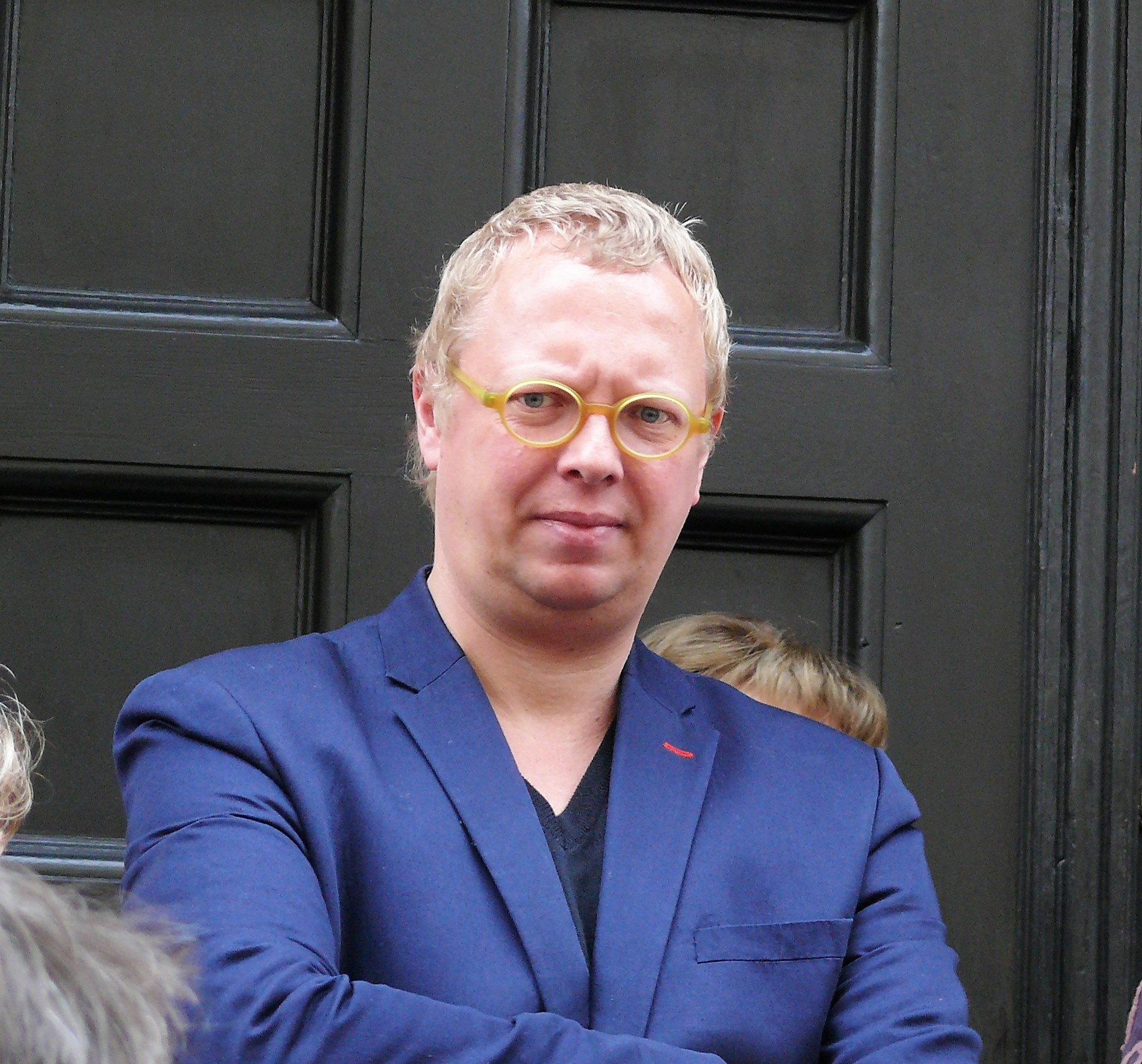 Tobias Hoffmann vor dem Bröhan-Museum 2013